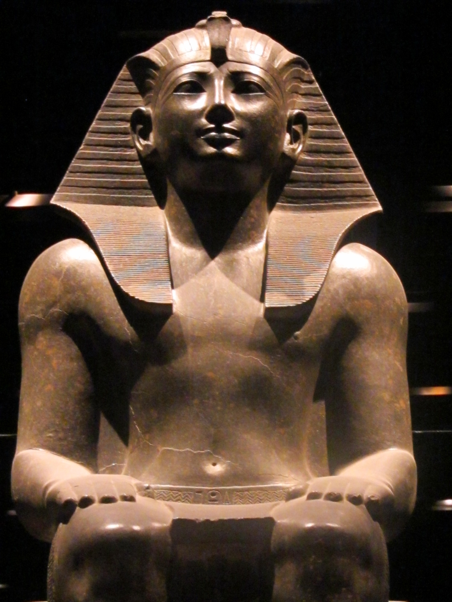 Il Re Thutmosi III. Diorite. Provenienza: Tebe, in seguito Collezione Drovetti, 1824. N. Inv. C. 1376. Museo Egizio (parte 2 del museo) Museoegizio.it